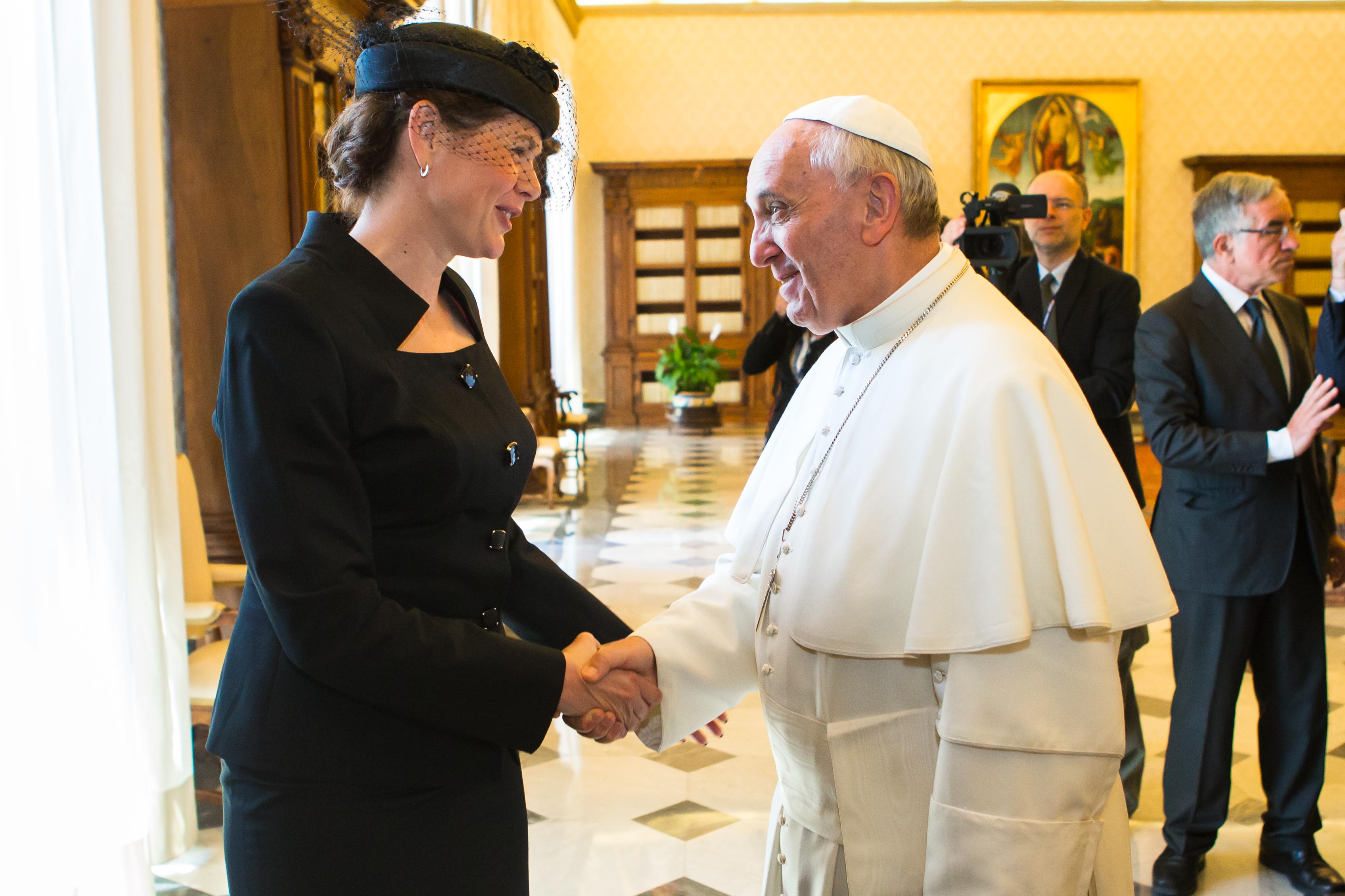 Srečanje premierke Alenke Bratušek s papežem Frančiškom